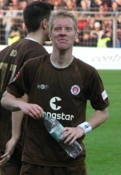 Timo Schultz Fußballer FC St.Pauli